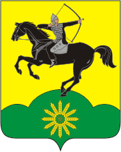 Герб Тихорецкого район Краснодарского края